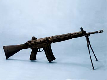 略称：89R 愛称：バディー [口径]5.56mm [全長] ・固定銃床型約920mm ・折り曲げ銃床型約670mm [銃身長]420mm [重量]3.5kg [作動方式]ガス圧利用 [給弾方式]弾倉式 [製作]豊和工業 現用64式小銃の更新近代化用で、平成元年度から取得開始。口径は、NATOの第二標準弾である5.56mmを採用している。固定銃床型と空挺隊員や戦車隊員など用の折り曲げ銃床式の2型式がある。銃床の素材には強化プラスチックを使うなど、一部に新素材を取り入れて、重量も64式小銃に比べ軽量化された。部品点数は64式小銃に比べ約10％少なく分解結合が容易にできる。単発と連発の切り替えができるほか、「3点制限点射」（スリー・ショット・バースト）方式を採用している